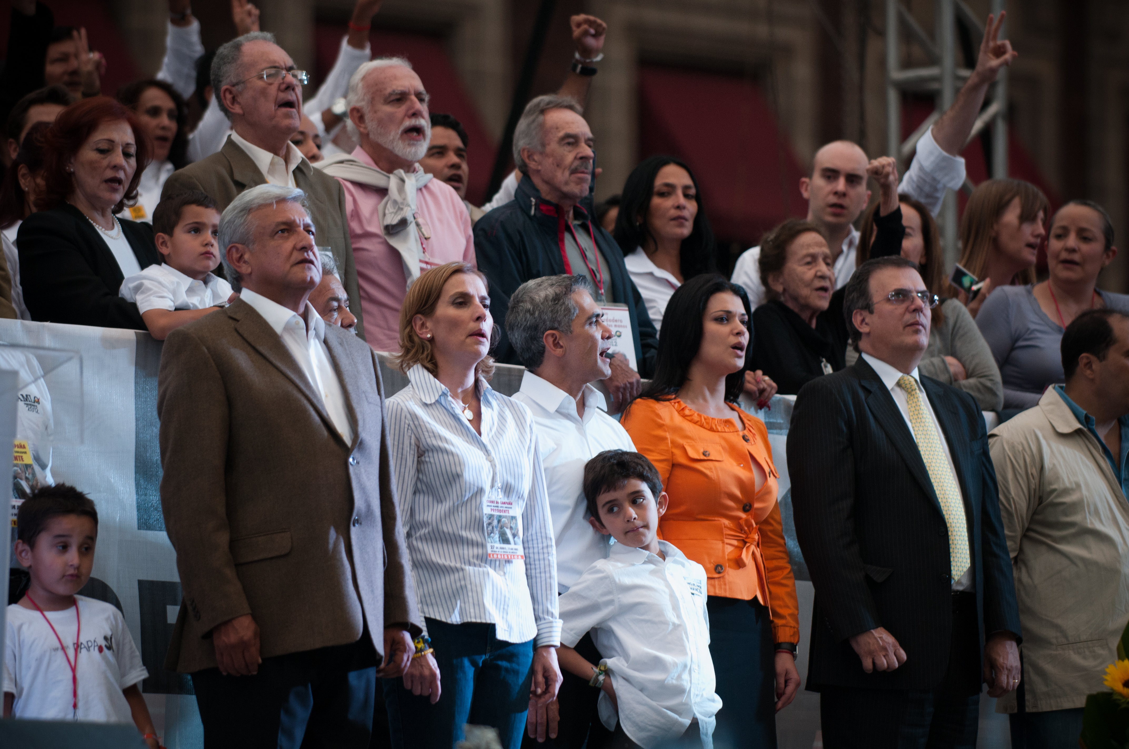 Algunos medios hablan de que se superó el millón de personas que asistieron al acto de Cierre de Campaña de AMLO, quien estuvo acompañado de su familia, su gabinete y Mancera